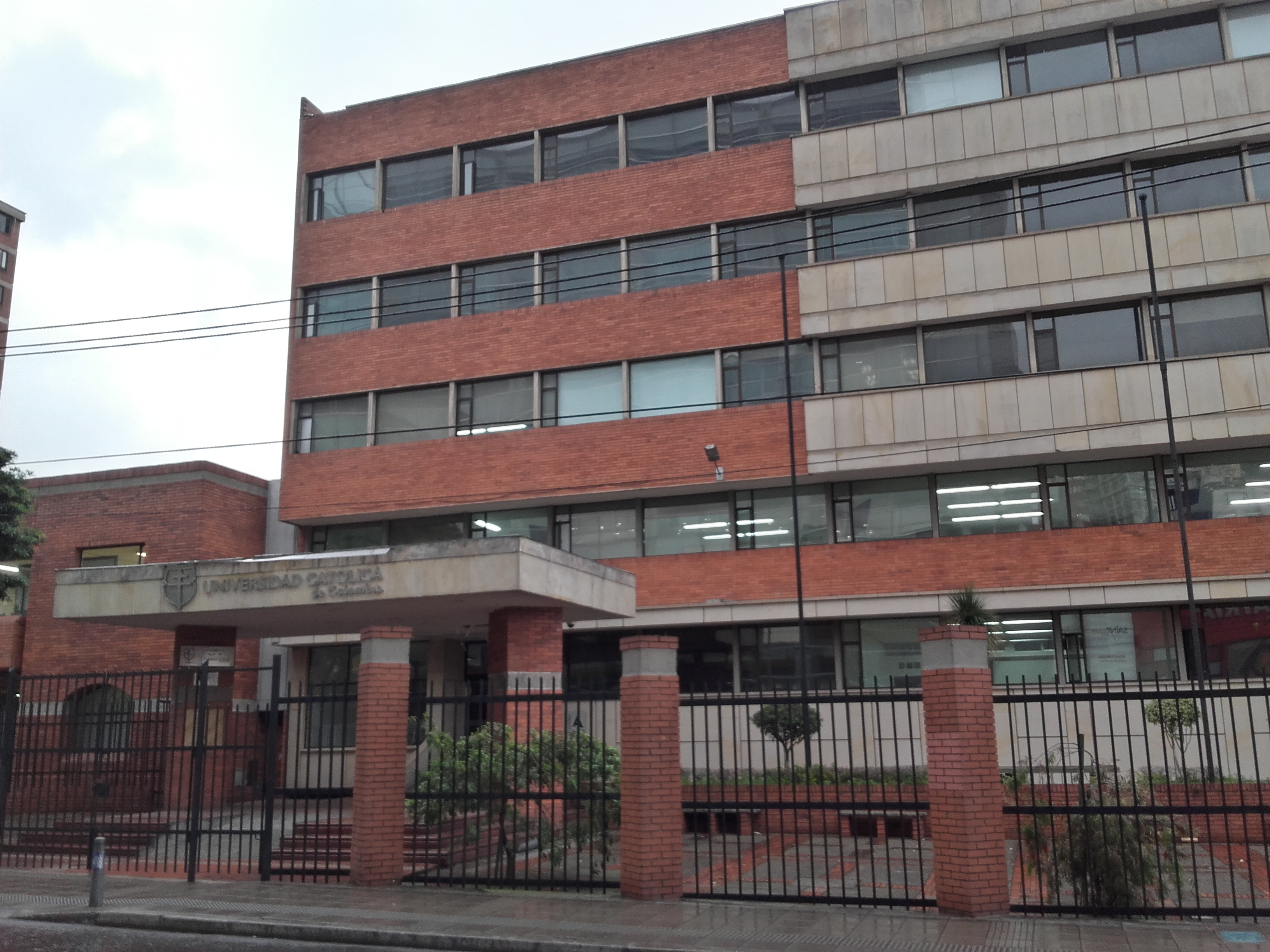 nfnffnnfnfn